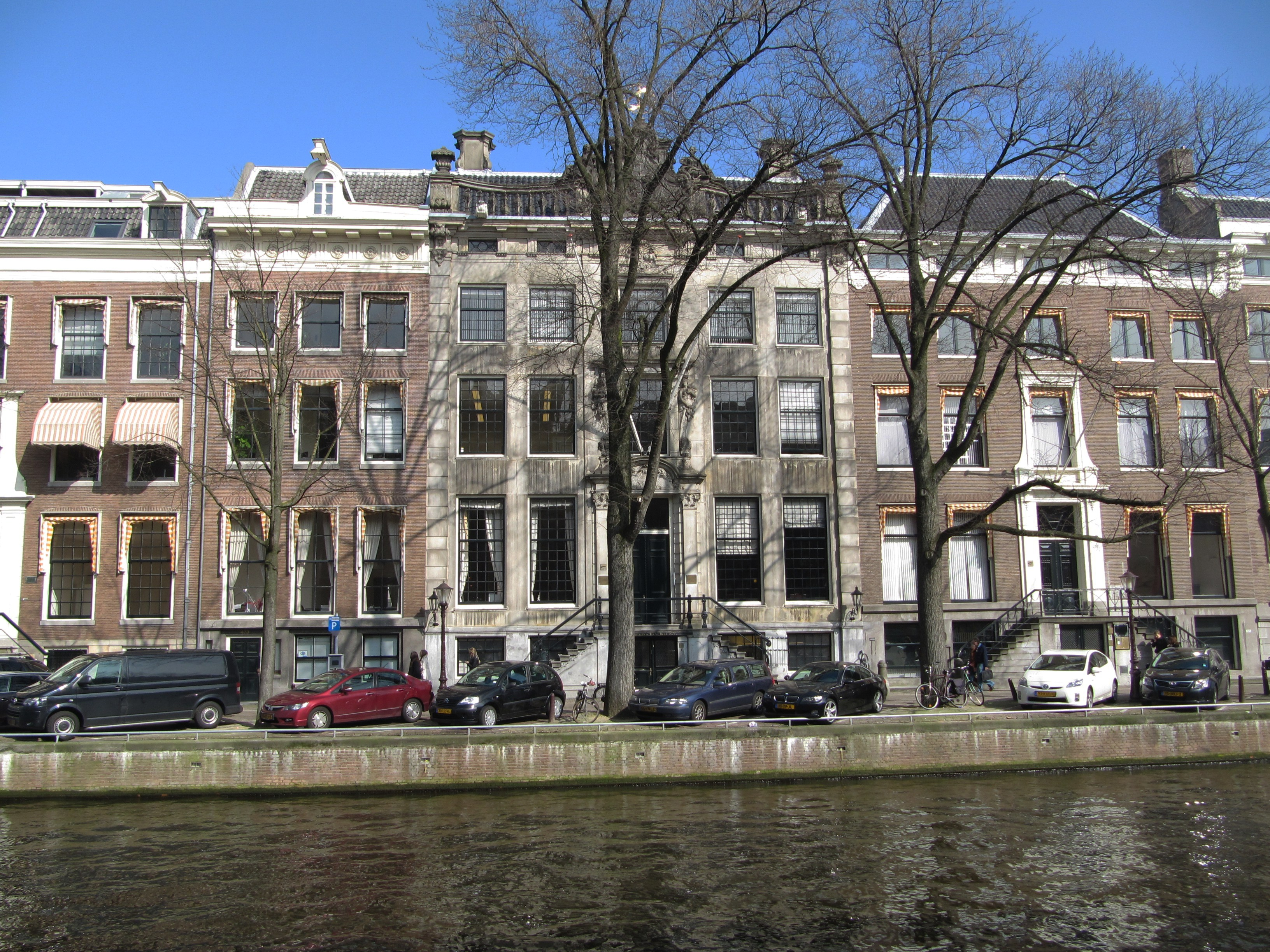 RM1651 Herengracht 475.jpg